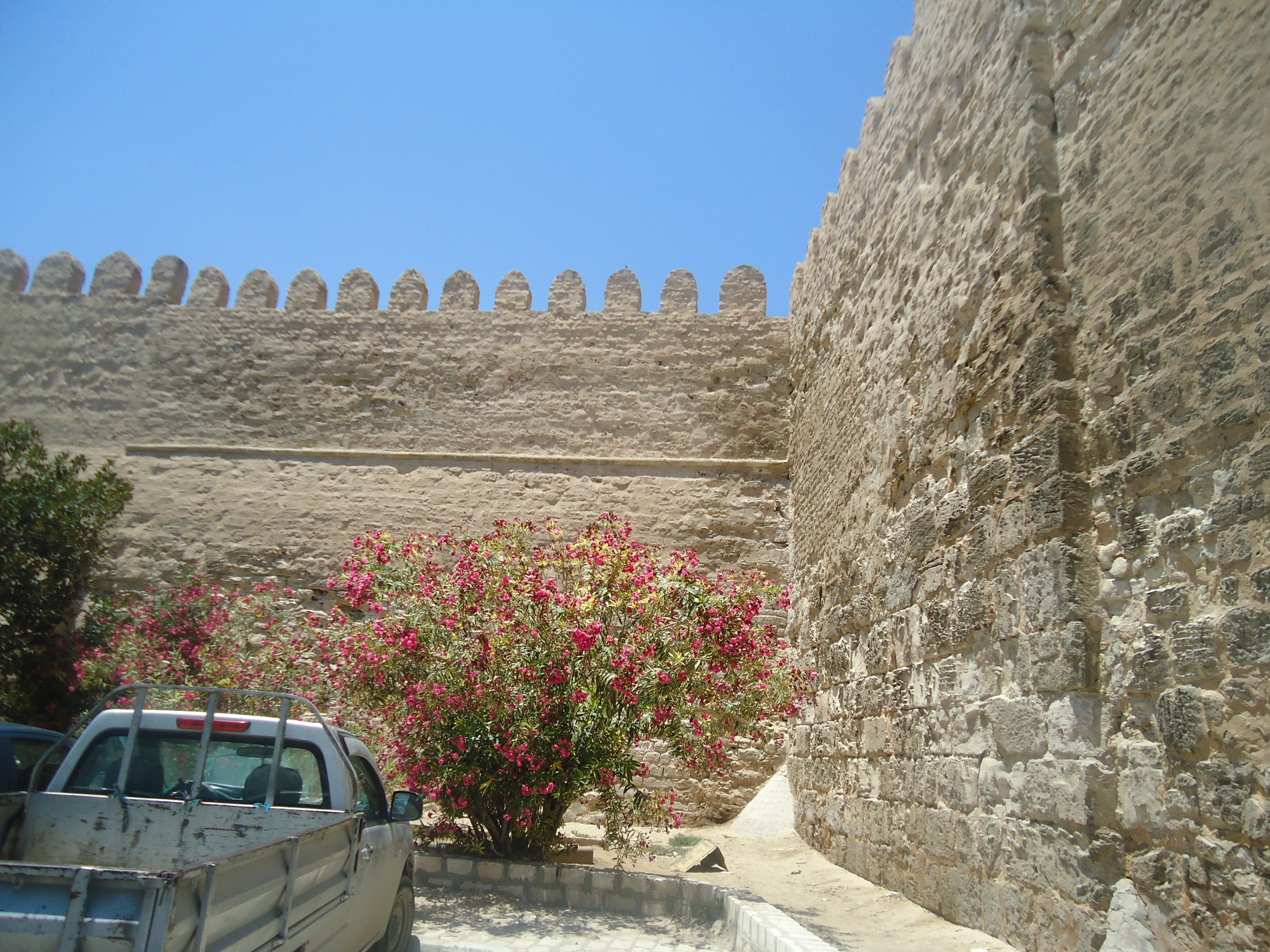 Тунис. Сүс ҡалаһындағы Бөйөк мәсет